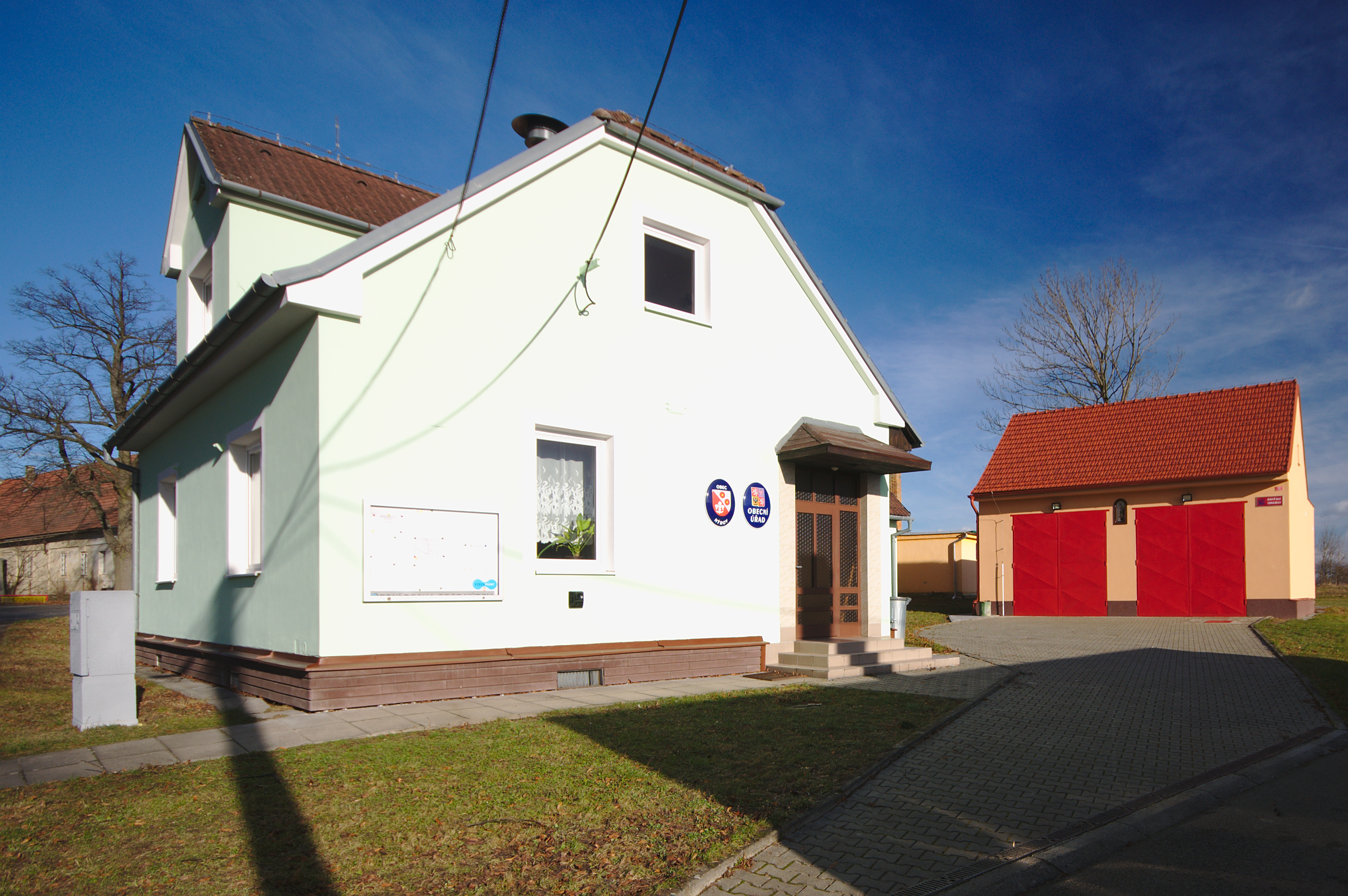 Obecní úřad, Nýrov, okres Blansko